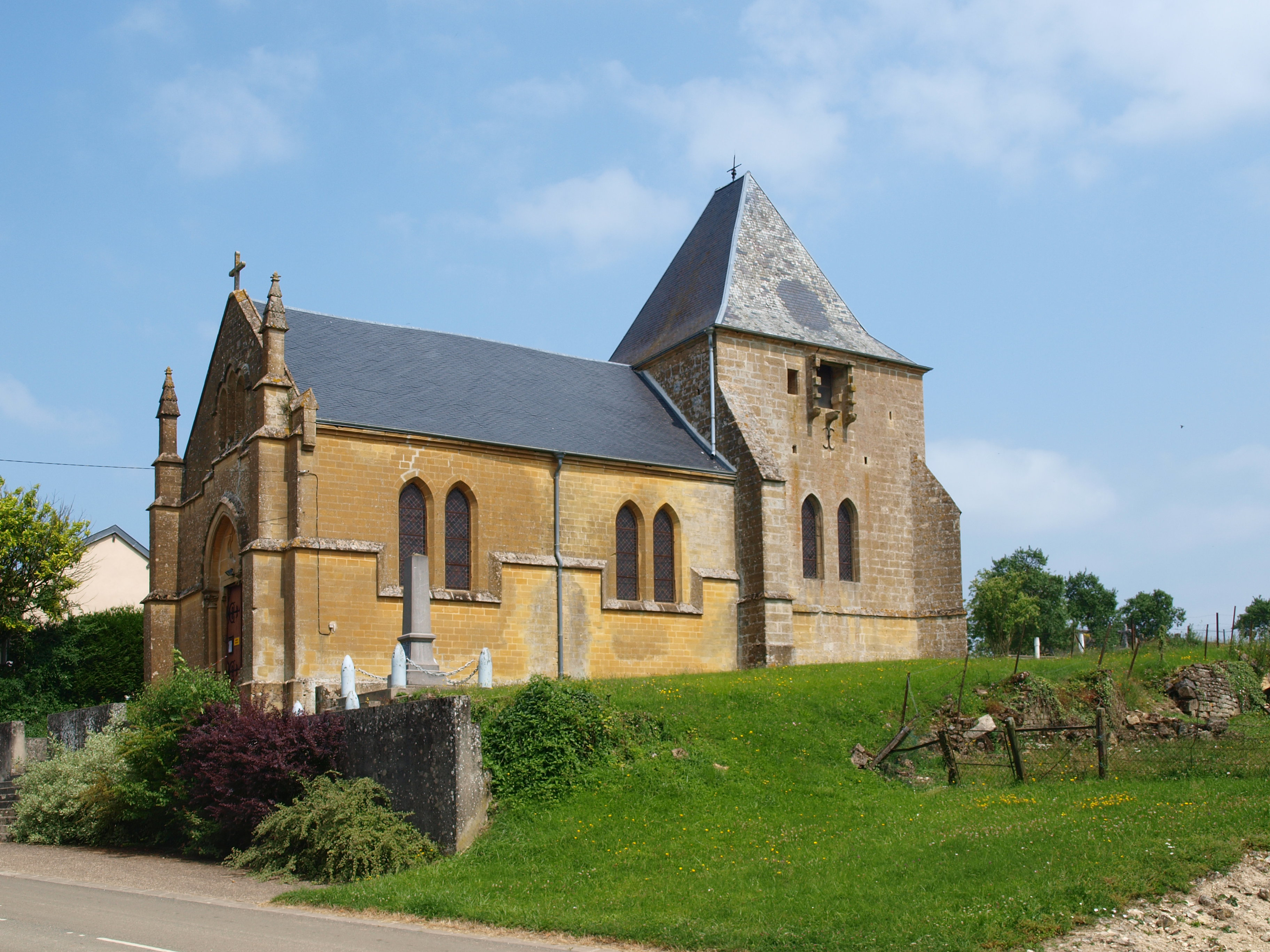 Verrières (Ardennes, France) , église